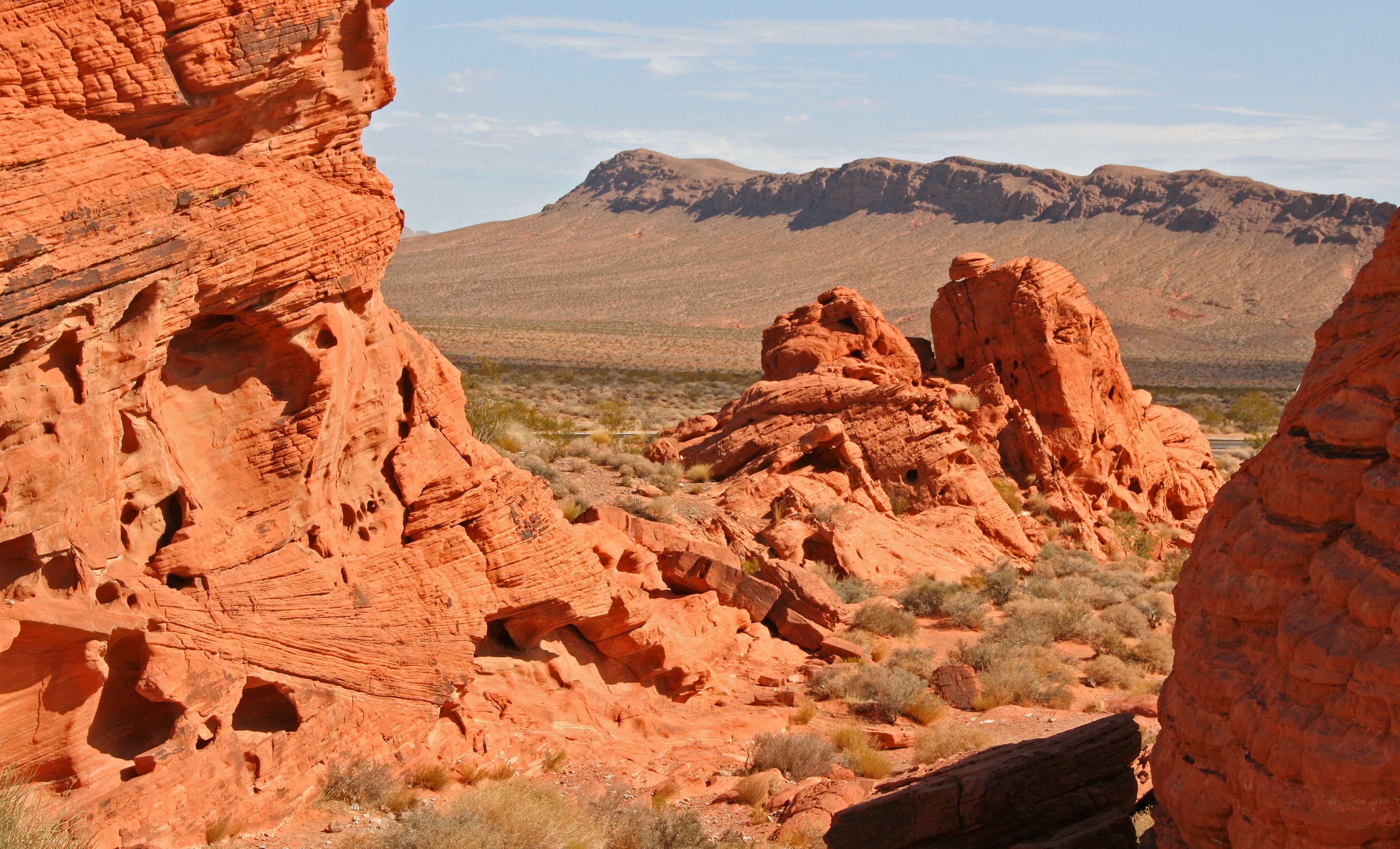 La Vallée du Feu dans l'état du Nevada